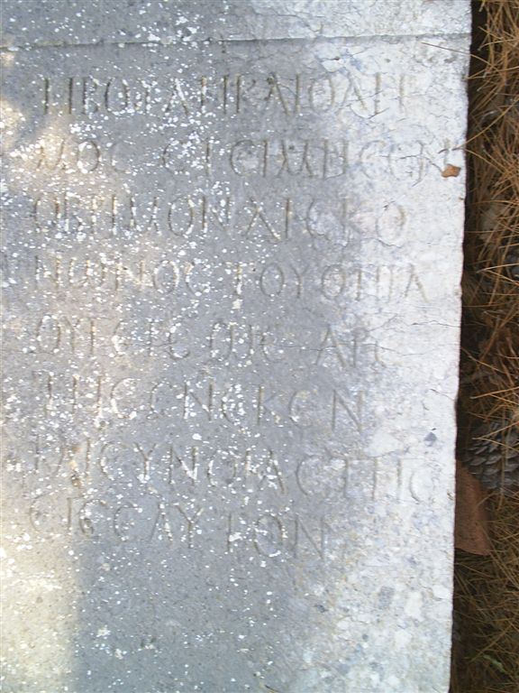 Ayasofya dan bir yazıt.